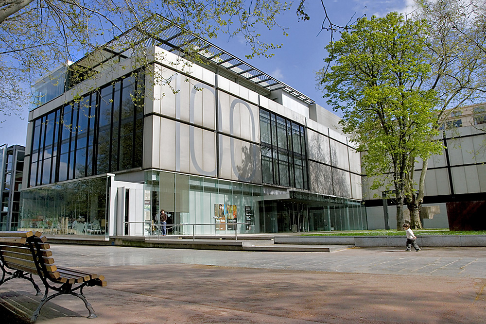 Museo de Bellas Artes de Bilbao: Fachada del edificio moderno y entrada principal al museo.